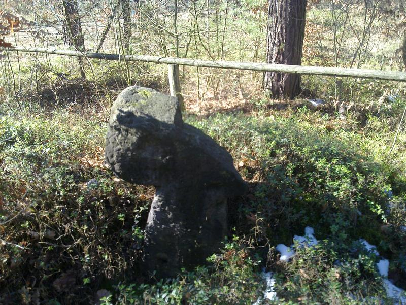 Sühnestein in Gräfendorf